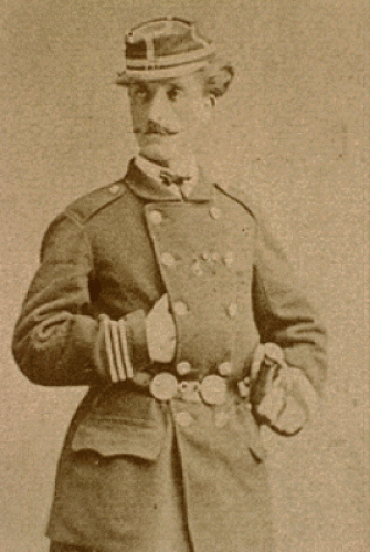 Jules Montels (né à Gignac (Hérault) le 25 mars 1843 et mort à Sfax le 20 septembre 1916) est un militant anarchiste, colonel de la Douzième légion fédérée de la Commune, délégué à Béziers et à Narbonne.